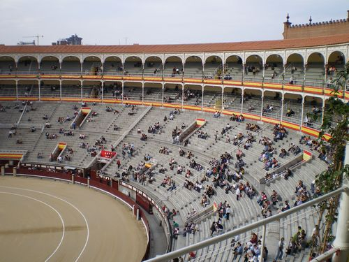 Las Ventas Inside